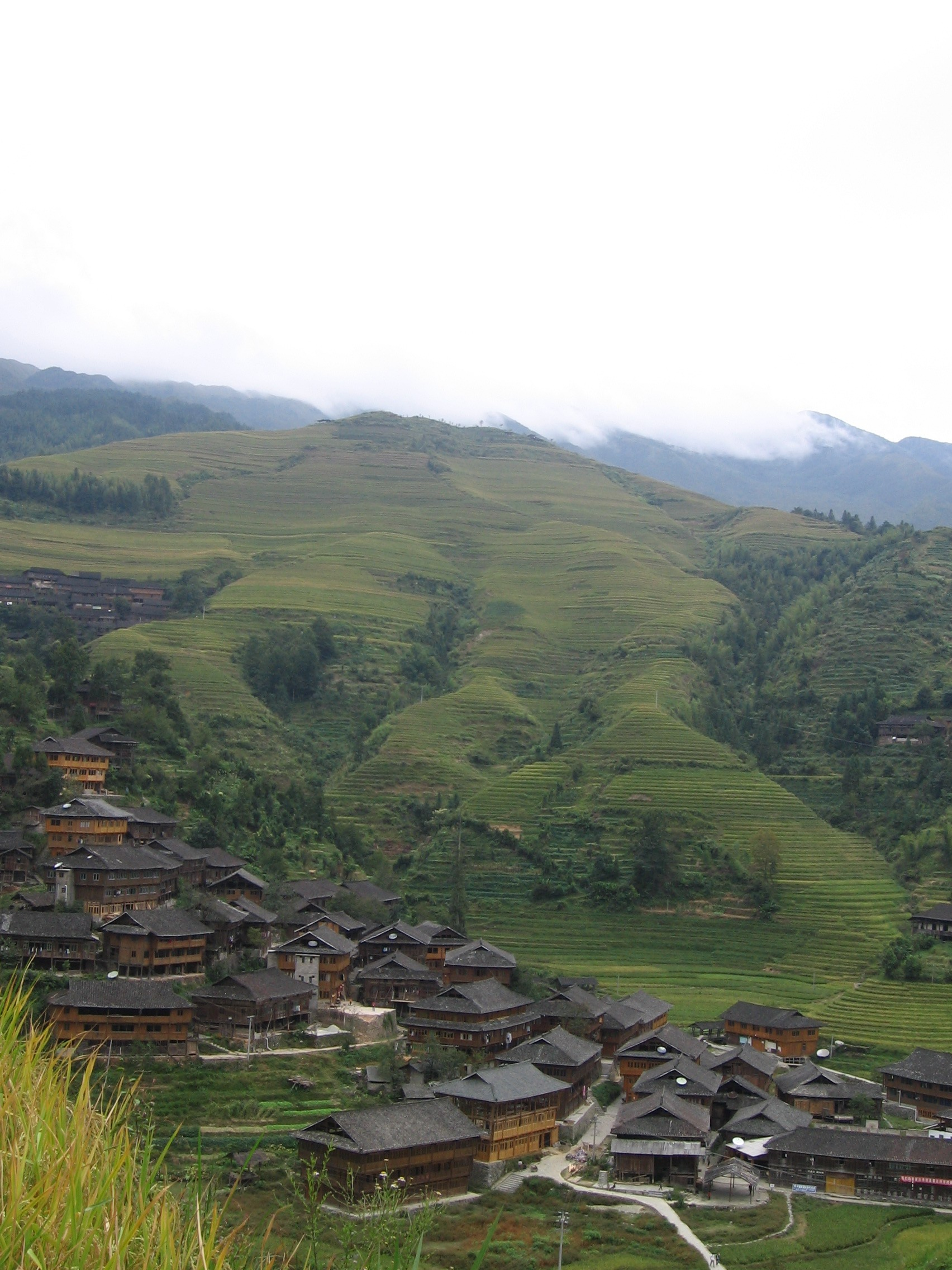 Bergdorf bei Longsheng (China) wo die Yao inmitten der Reisterassen an den Berghängen leben.